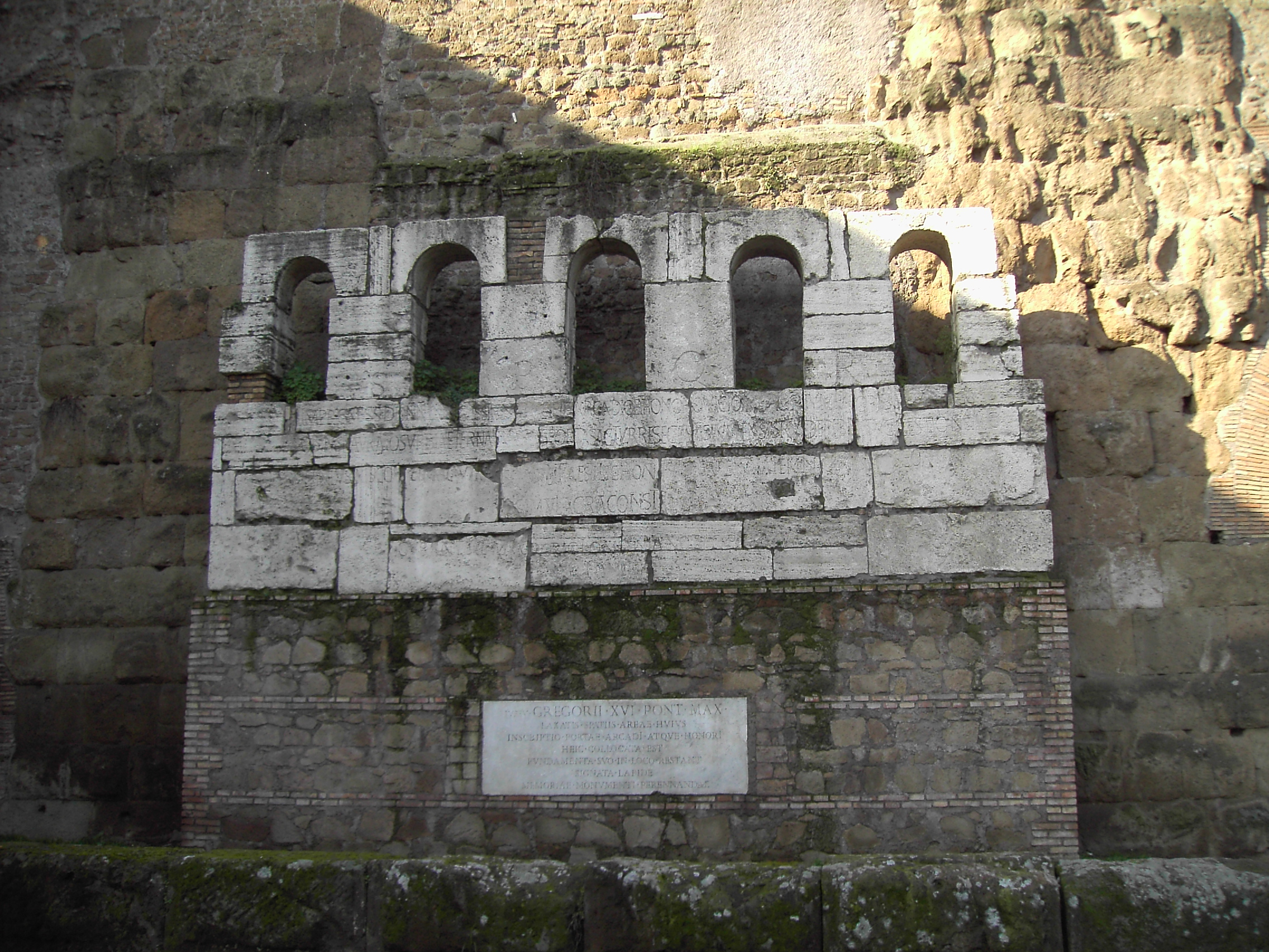 Roma, Porta Maggiore: la porta Onoriana e memoria del restauro di Gregorio XVI. CIL VI 1189.